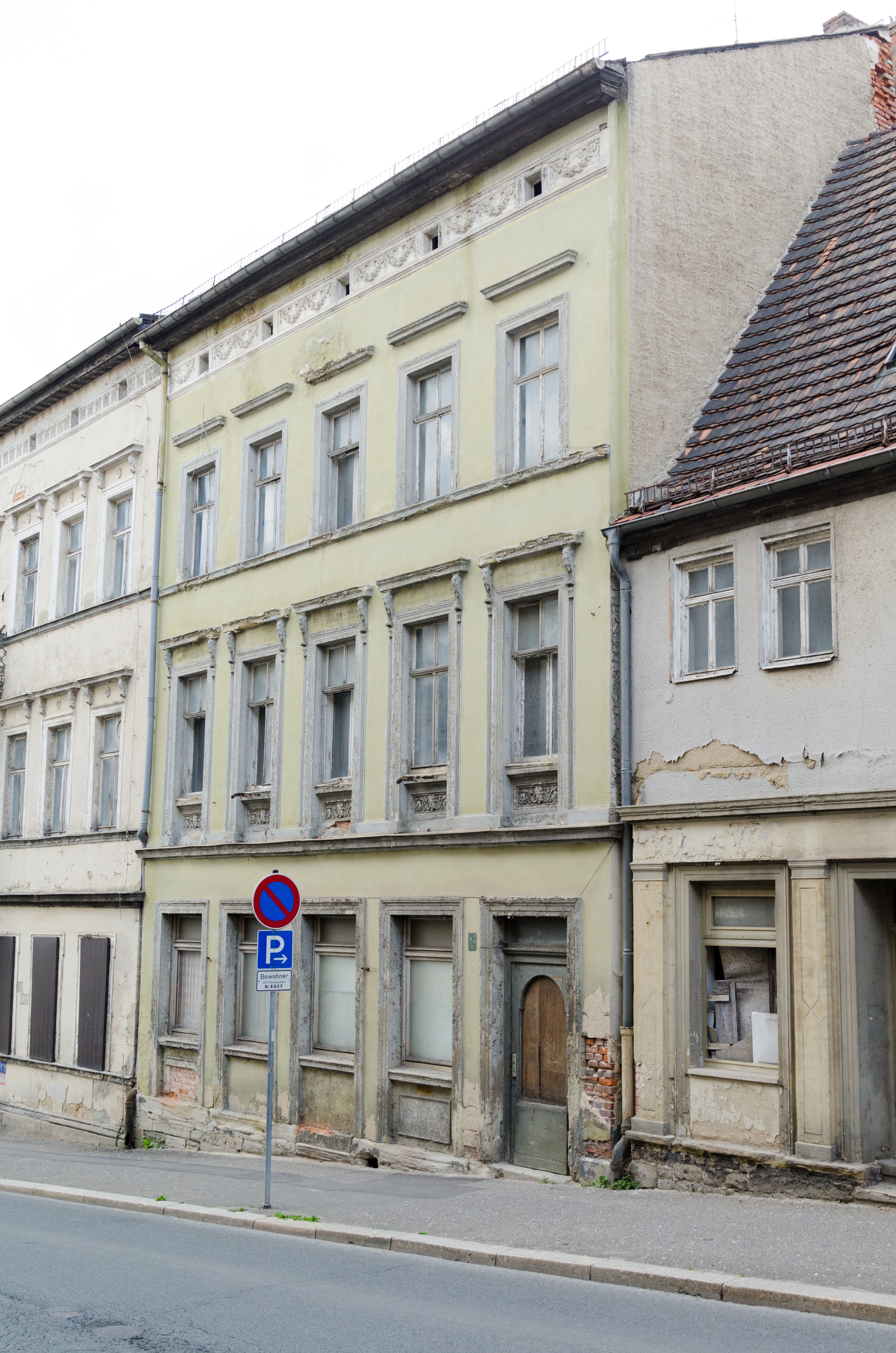 Zeitz, Rahnestraße 6